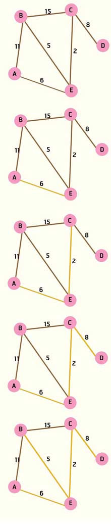 ขั้นตอนวิธีการของพริม